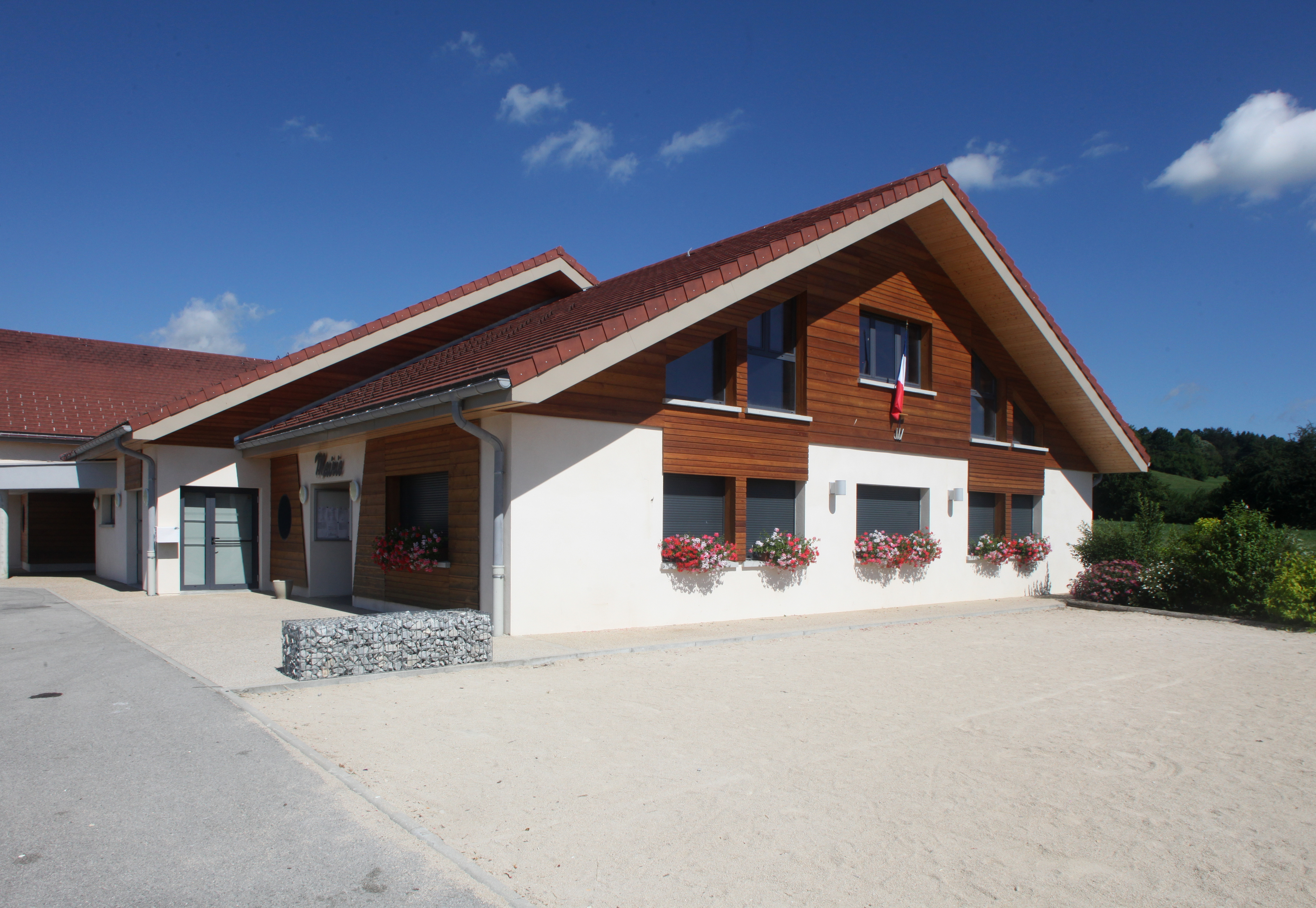 Mairie de La Longeville (Doubs).